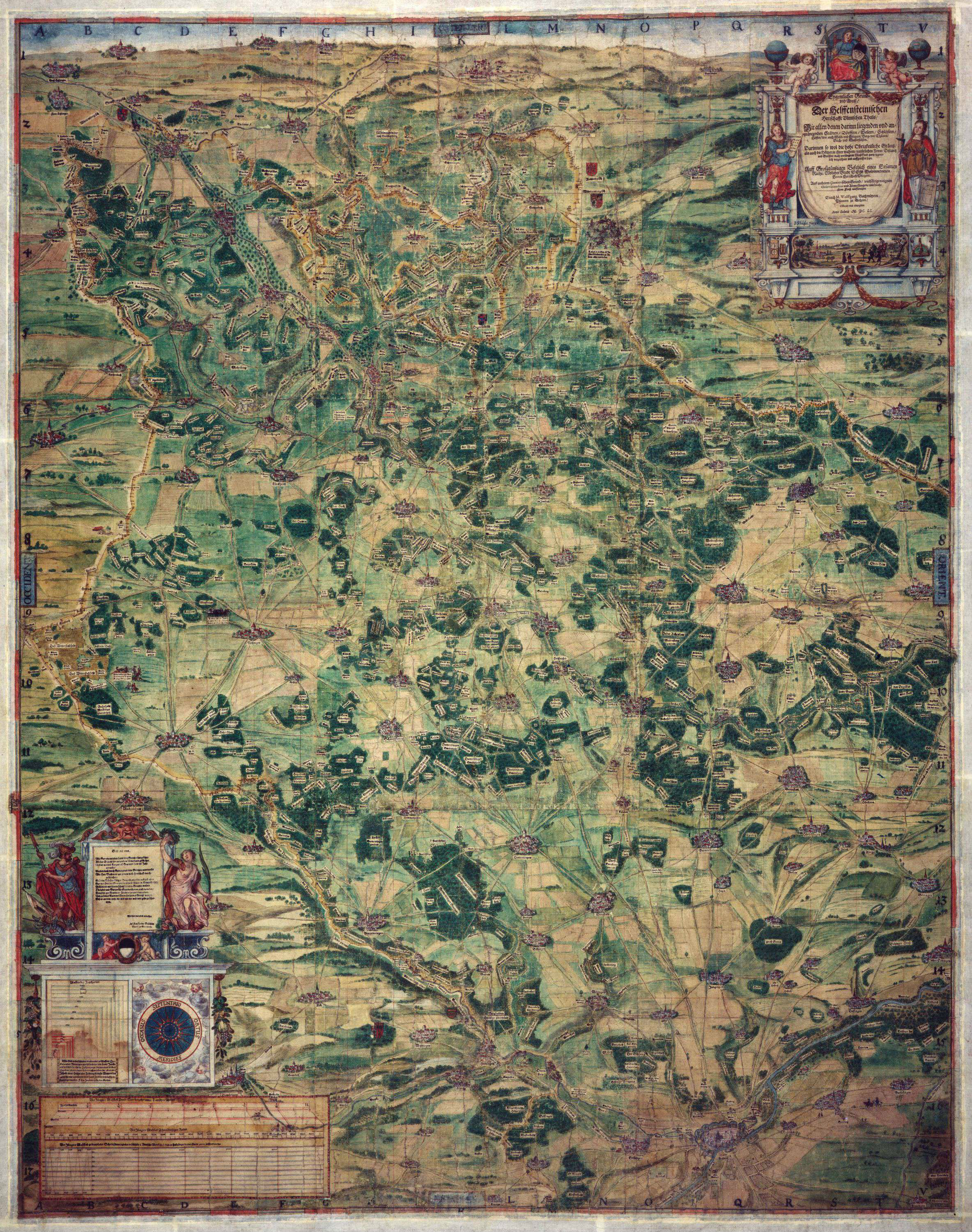 Eygentlicher Grund- und Abriß der Helfensteinischen Herrschaft Ulmischen Theils, (...) darinnen sowol die obrigkeitliche Gränze als auch die Hölzer in ihrer wahren natürlichen Form, Distanz und Grössen aufgerissen seyn: Eine Karte (133 x 174 cm) des Ulmer Anteils an der Herrschaft Helfenstein, 1651, entworfen von Wolfgang Bachmeyer und gemalt (pinxit) von Johann Stöltzlin. Hauptstaatsarchiv Stuttgart, N 11 Nr. 2